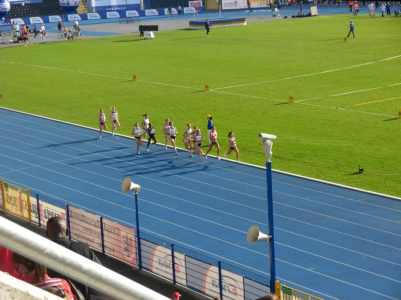 Miting lekkoatletyczny Enea Cup na stadionie Zawiszy Bydgoszcz w 2010 roku